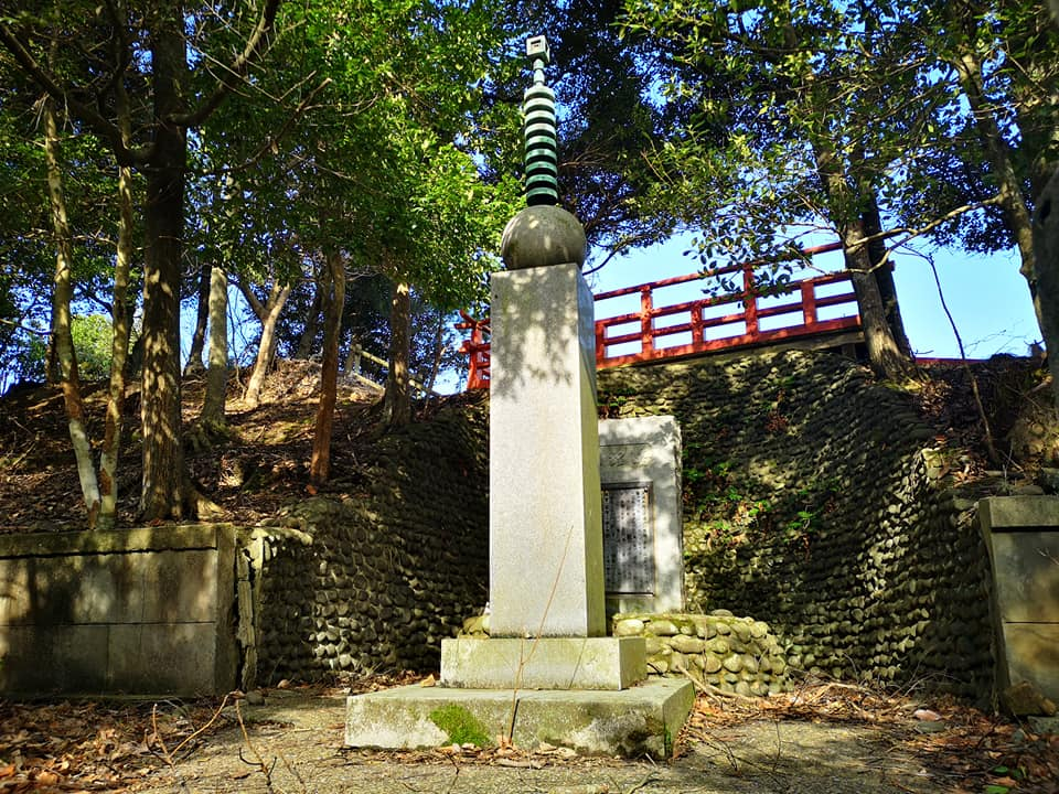 京丹後市網野町磯にある溝尻房蔵の顕彰地・光潤乃杜